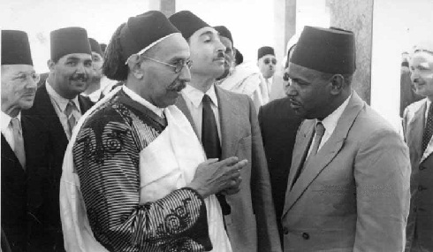 Idris der I. ( 12.März 1890 - 25.Mai 1983 ) war der erste König von Libyen und herrschte von 1951 bis 1969. Er war der Enkel von Sayyid Muhammad bin 'Ali as-Senussi, dem Gründer und Kopf der Senussi Muslim sufi order. Er erbte diese Position im Jahre 1916.